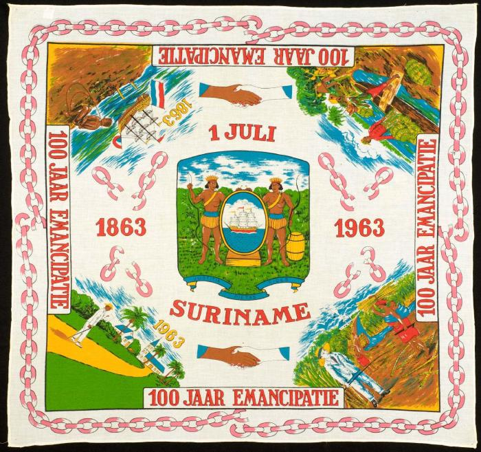 Hoofddoek. Nagenoeg vierkante hoofddoek ter herdenking dat 100 jaar geleden de slavernij in Suriname werd afgeschaft. De doek is omrand door een ketting die op verschillende plaatsen is gebroken ('keti-koti'). In elke hoek is een slavernij-tafereel uitgebeeld. Op elke zijde van de doek staat in rode letters: "100 jaar Emancipatie". In het midden staat een op het Surinaamse gelijkend wapenschild met daar omheen tekst en twee in elkaar grijpende handen. De hoofddoek wordt door Creoolse vrouwen gedragen op 1 juli maar kan ook als siervoorwerp aan de wand gehangen worden of als tafelkleedje gebruikt worden. Angisa's vormen onderdeel van de dracht van een kotomisi. De koto is een in Suriname ontstane klederdracht die werd bedacht door slavenhouders en hun vrouwen om hun slavinnen 'zedig' te kleden. De dracht bestaat uit een koto (rok), jaki (jak) en angisa (hoofddoek). Aan de dracht kon men aflezen tot welke godsdienst de slavenhouder behoorde. Hoewel vroeger dagelijkse kleding, veranderde de koto later in gelegenheidskleding. De koto en vooral de angisa spraken en spreken een geheime taal (Henar-Hewitt, 1987:35). . Surinaams-Creoolse hoofddoek ter herdenking van de 100-jarige afschaffing der slavernij op 1 juli 1863 Undetermined language : Angisa